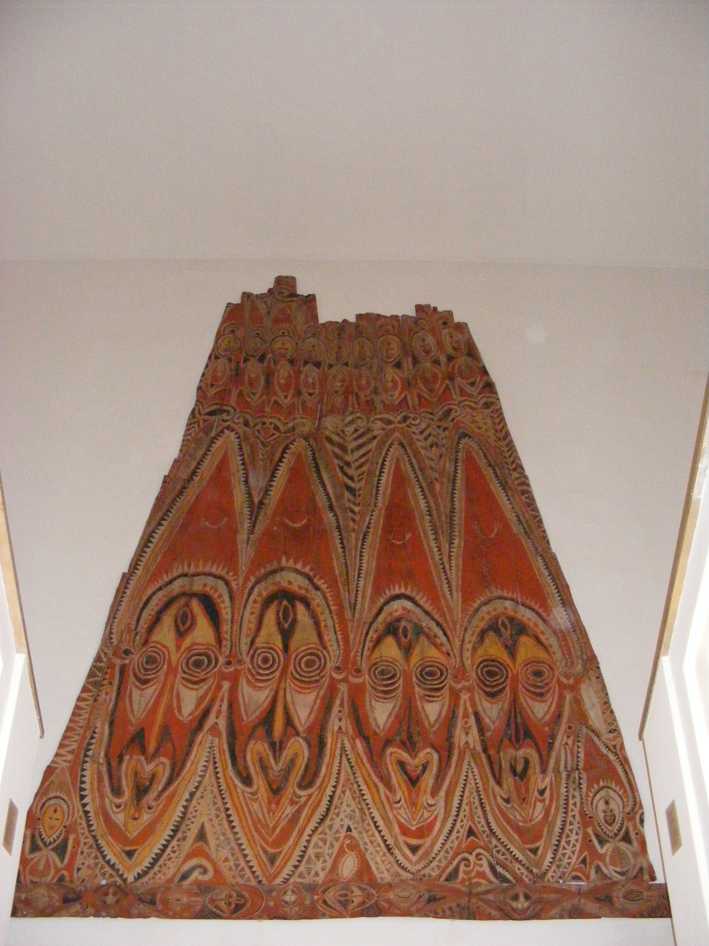 Giebelwand eines Zeremonial-Giebelhauses der Abelam in Kinbangwa, Nord-Guinea (Exponat im Staatlichen Museum für Völkerkunde München, aus der Sammlung Adolf J. Schuster, Neuendettelsau, erworben 1975)